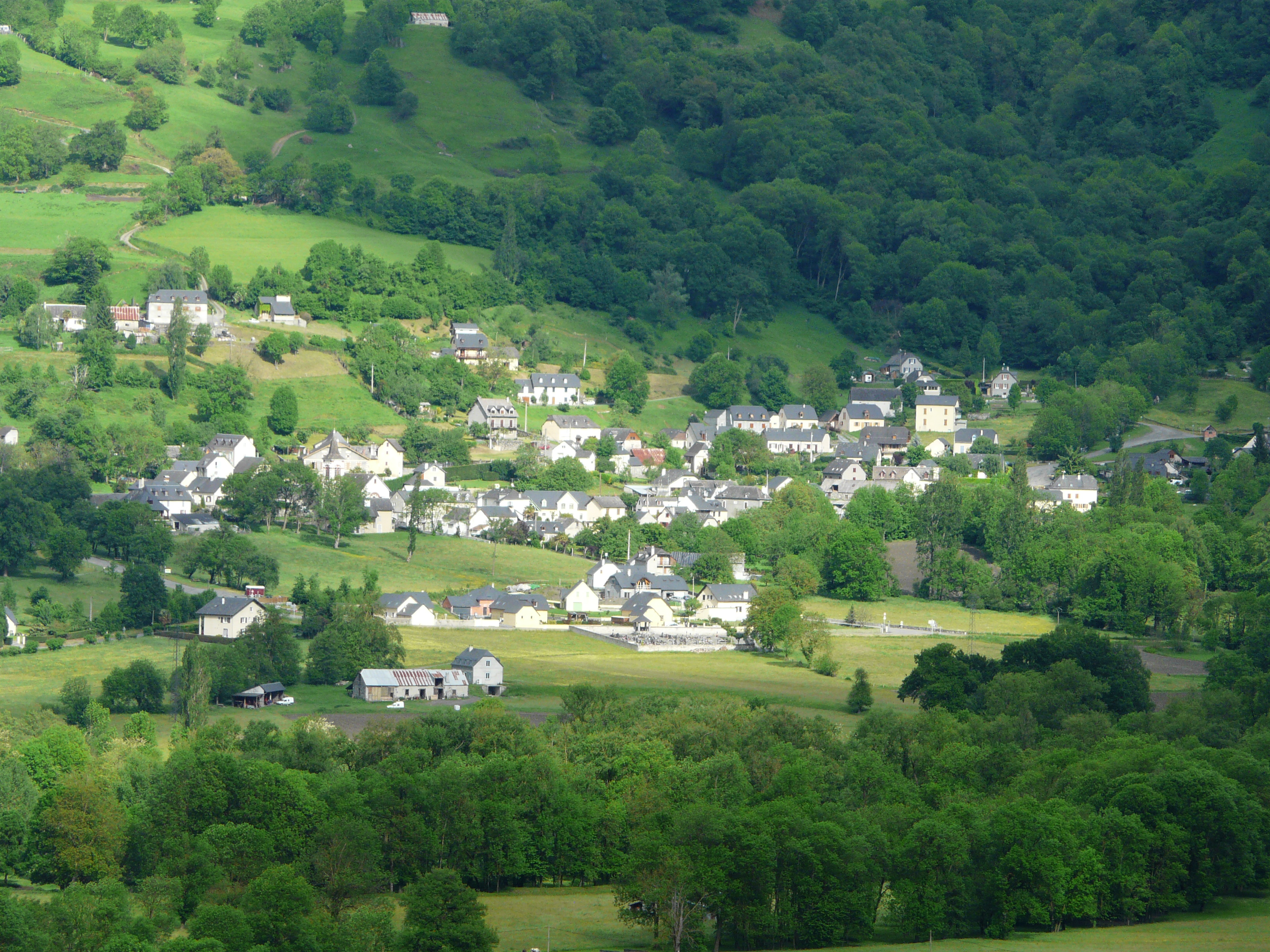 Le village de Beaucens, Hautes-Pyrénées, France.